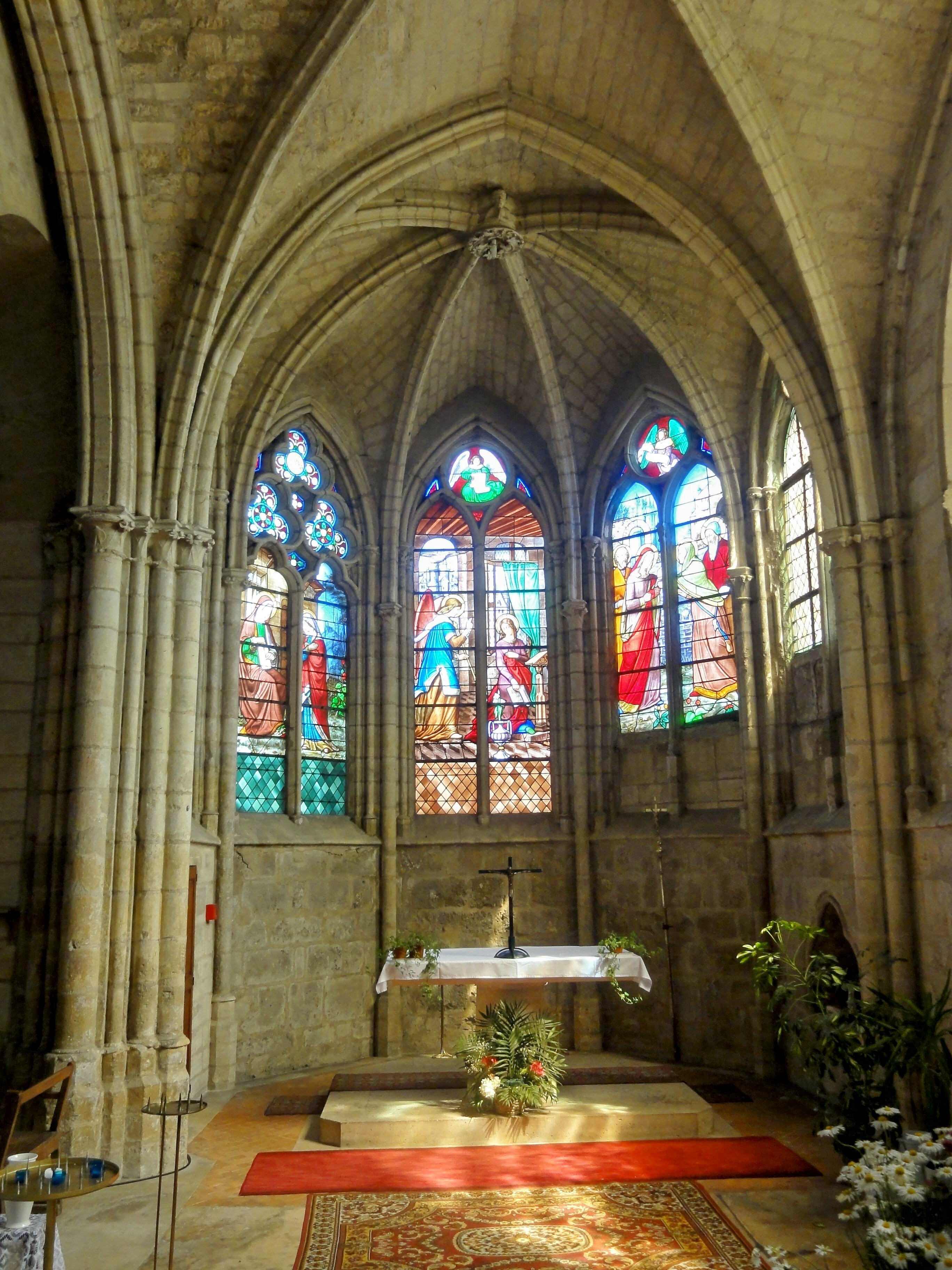 Chapelle de la Vierge.